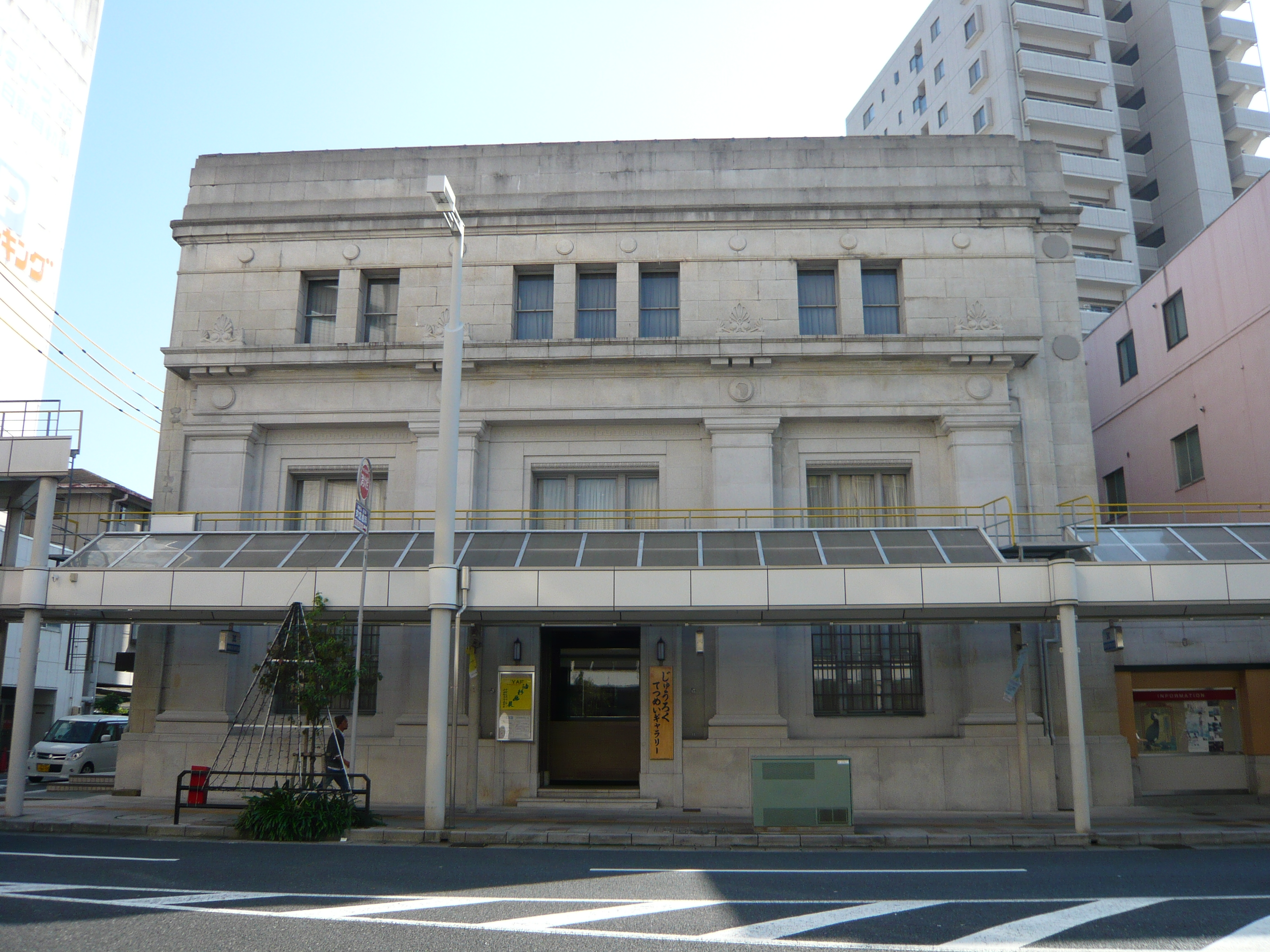 じゅうろく徹明ギャラリー（旧十六銀行徹明支店）